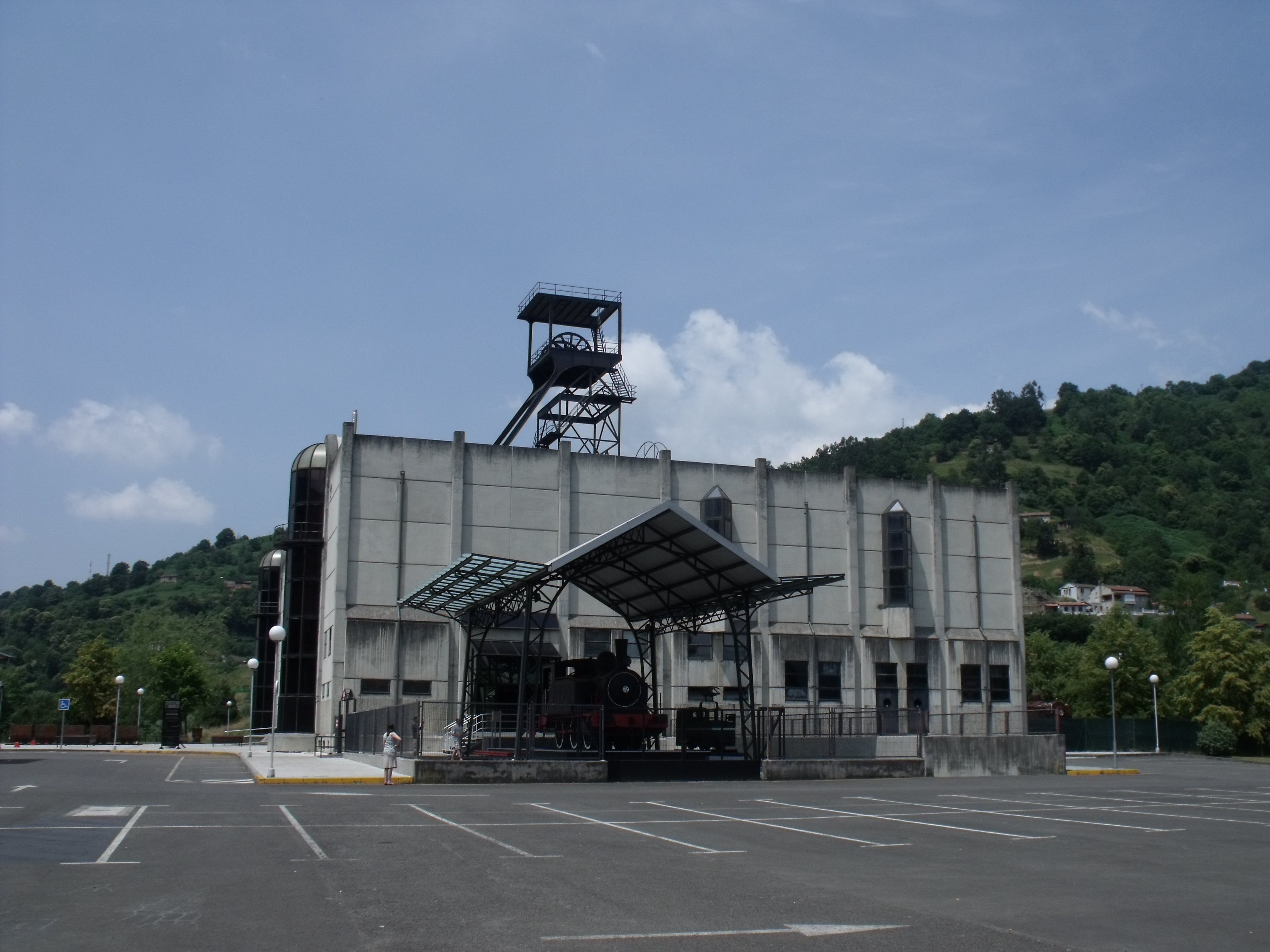 Museo de la Minería y de la Industria de Asturias.